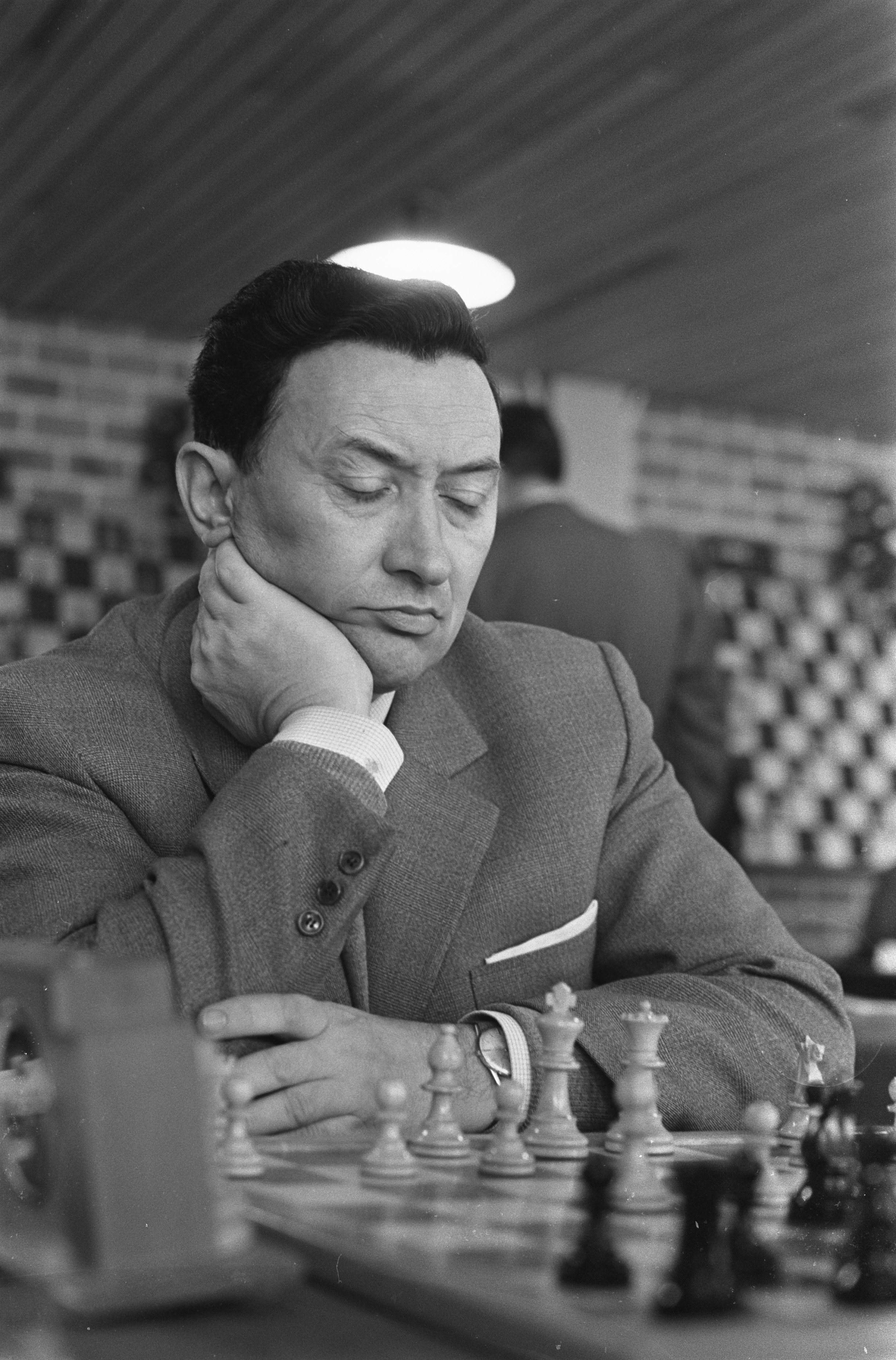 Collectie / Archief : Fotocollectie Anefo Reportage / Serie : [ onbekend ] Beschrijving : Hoogovenschaaktoernooi, N. Karaklaic (Yugo-Slavie) Datum : 12 januari 1968 Locatie : Joegoslavië Trefwoorden : schaken Persoonsnaam : N. Karaklaic Instellingsnaam : Hoogovenschaaktoernooi Fotograaf : Kroon, Ron / Anefo Auteursrechthebbende : Nationaal Archief Materiaalsoort : Negatief (zwart/wit) Nummer archiefinventaris : bekijk toegang 2.24.01.05 Bestanddeelnummer : 920-9842